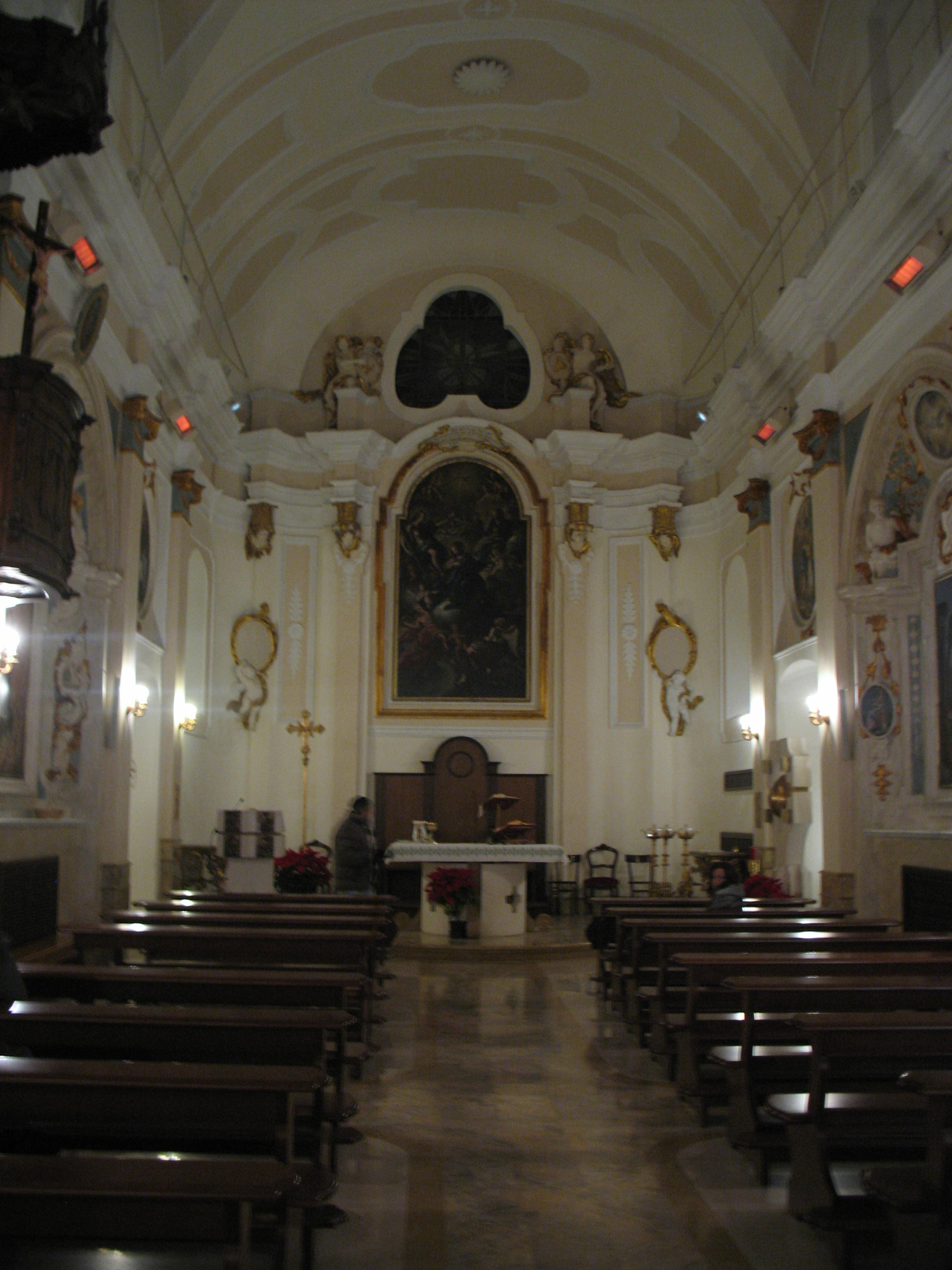 Altare maggiore della Chiesa della Santissima Trinità di Chieti